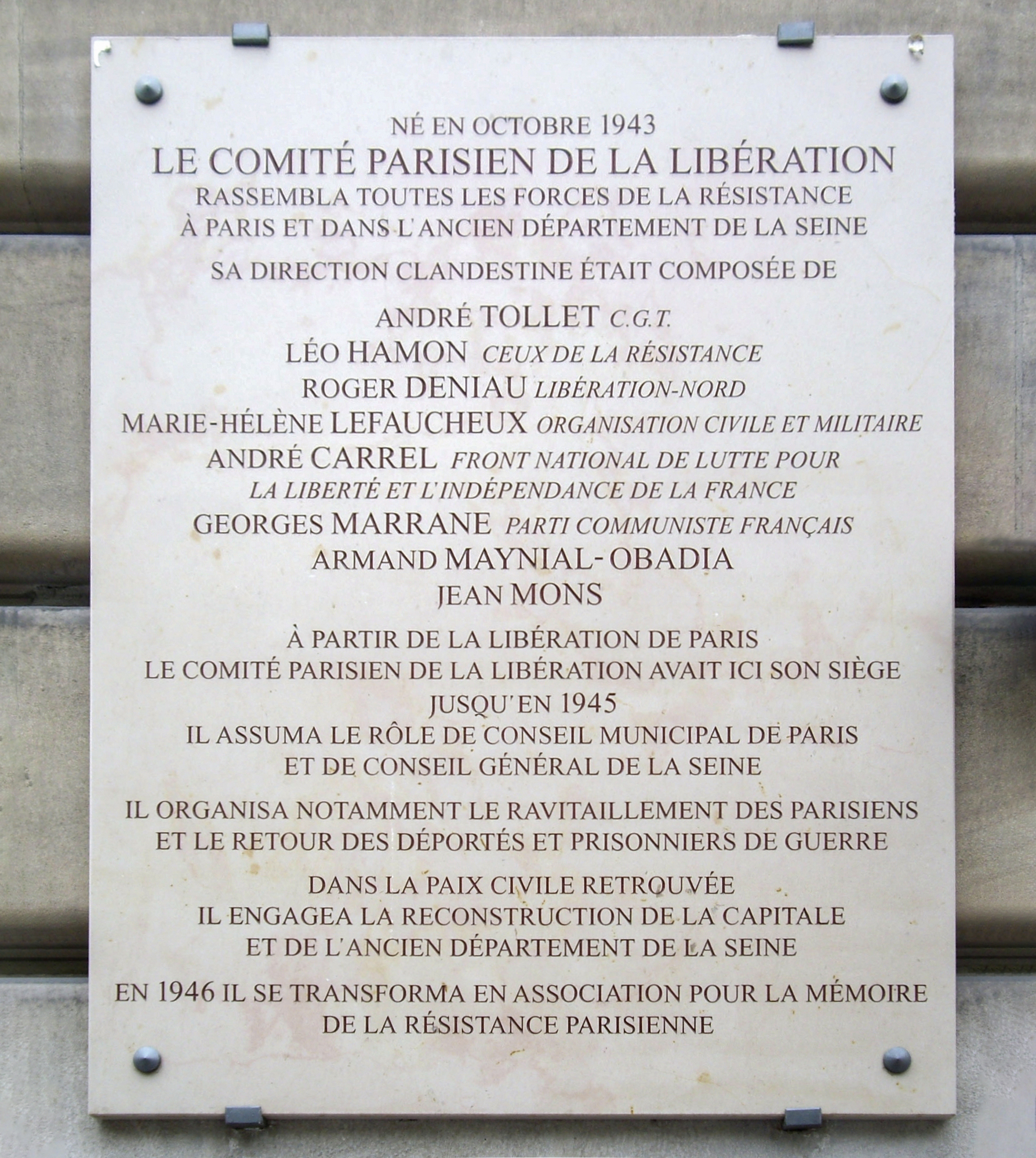 Plaque apposée sur la façade de la Bourse du travail, au n° 3 de la rue du Château-d'Eau, Paris 10e, en mémoire du Comité parisien de la Libération, avec une description de sa composition et de ses activités de 1943 à 1946.